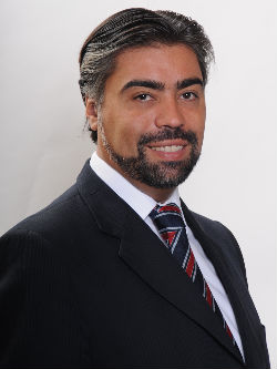 Giovanni Oscar Calderón Bassi